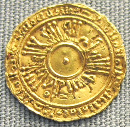 Salerno, tari di gisulfo I sul conio di un dinar fatimide, 946-977 ca